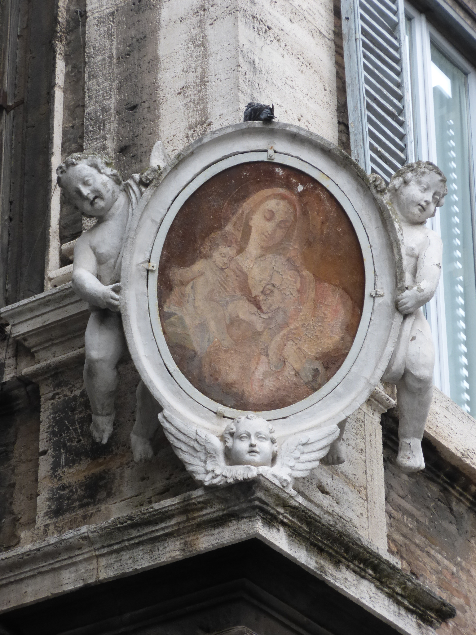 Roma, via di Monserrato angolo via dei Farnesi: Madonna col bambino e S. Filippo Neri al cantone di palazzo Fioravanti.